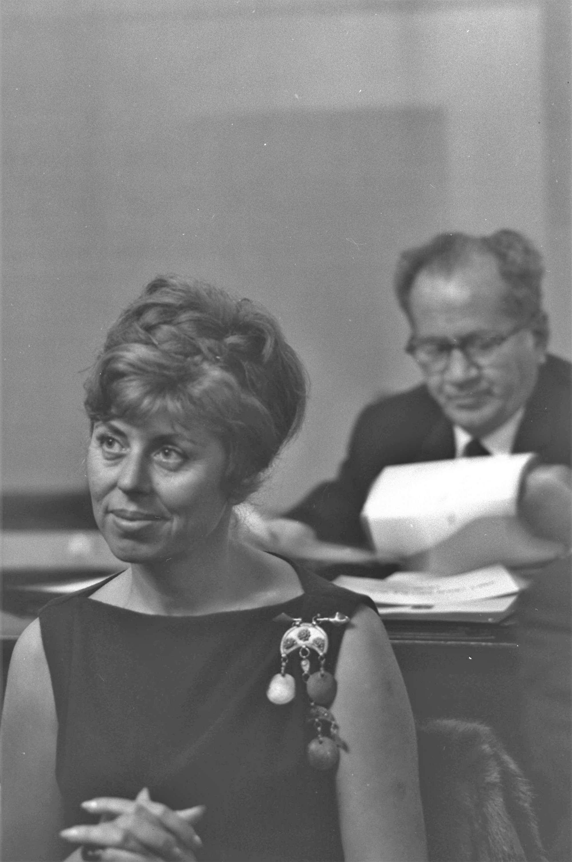 שולמית אלוני וזאב שרף בישיבת הפתיחה של הכנסת השישית קוד תמונה D41-119 מס סדורי 005716